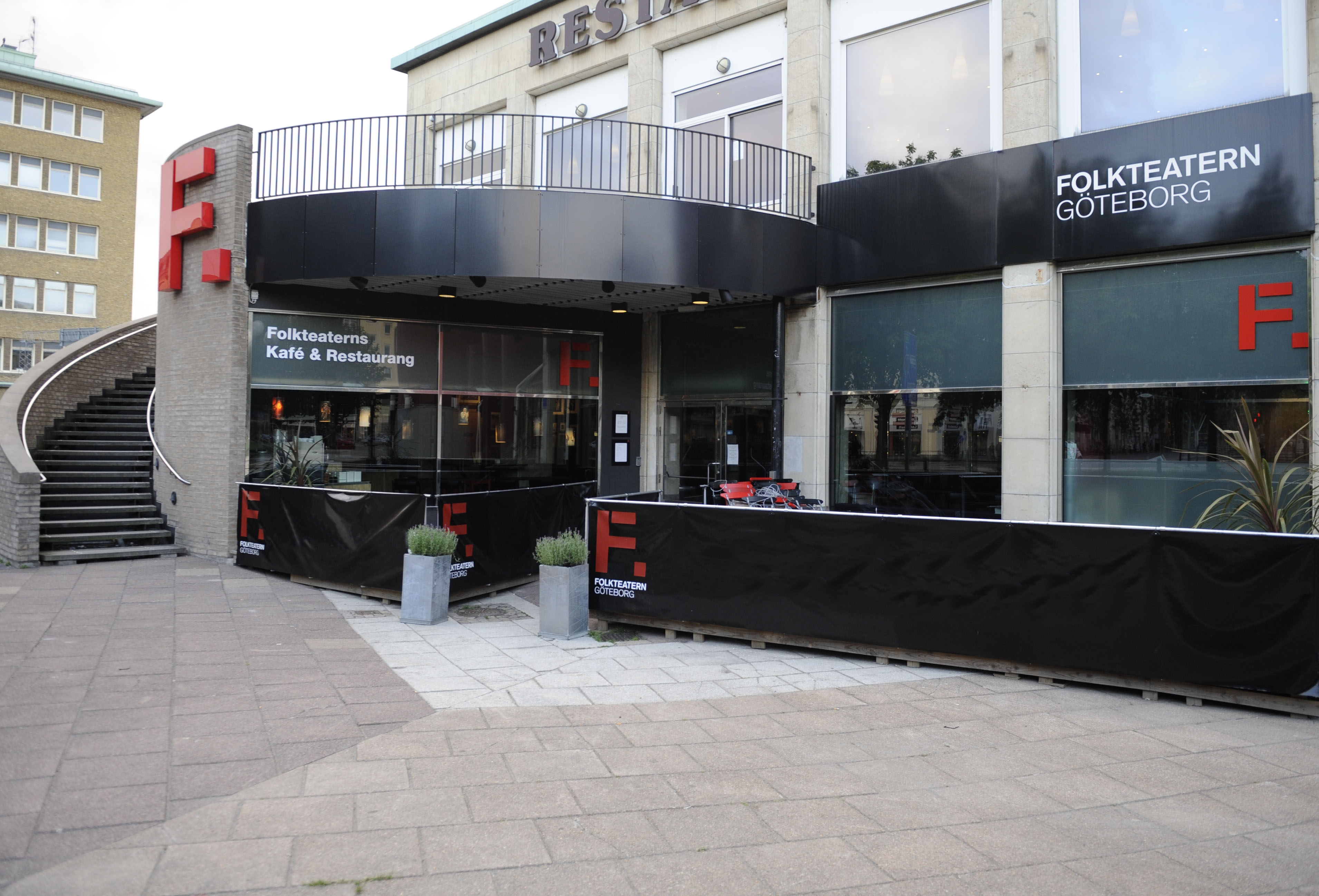 Folkteaterns entré. Foto: Patrik Gunnar Helin